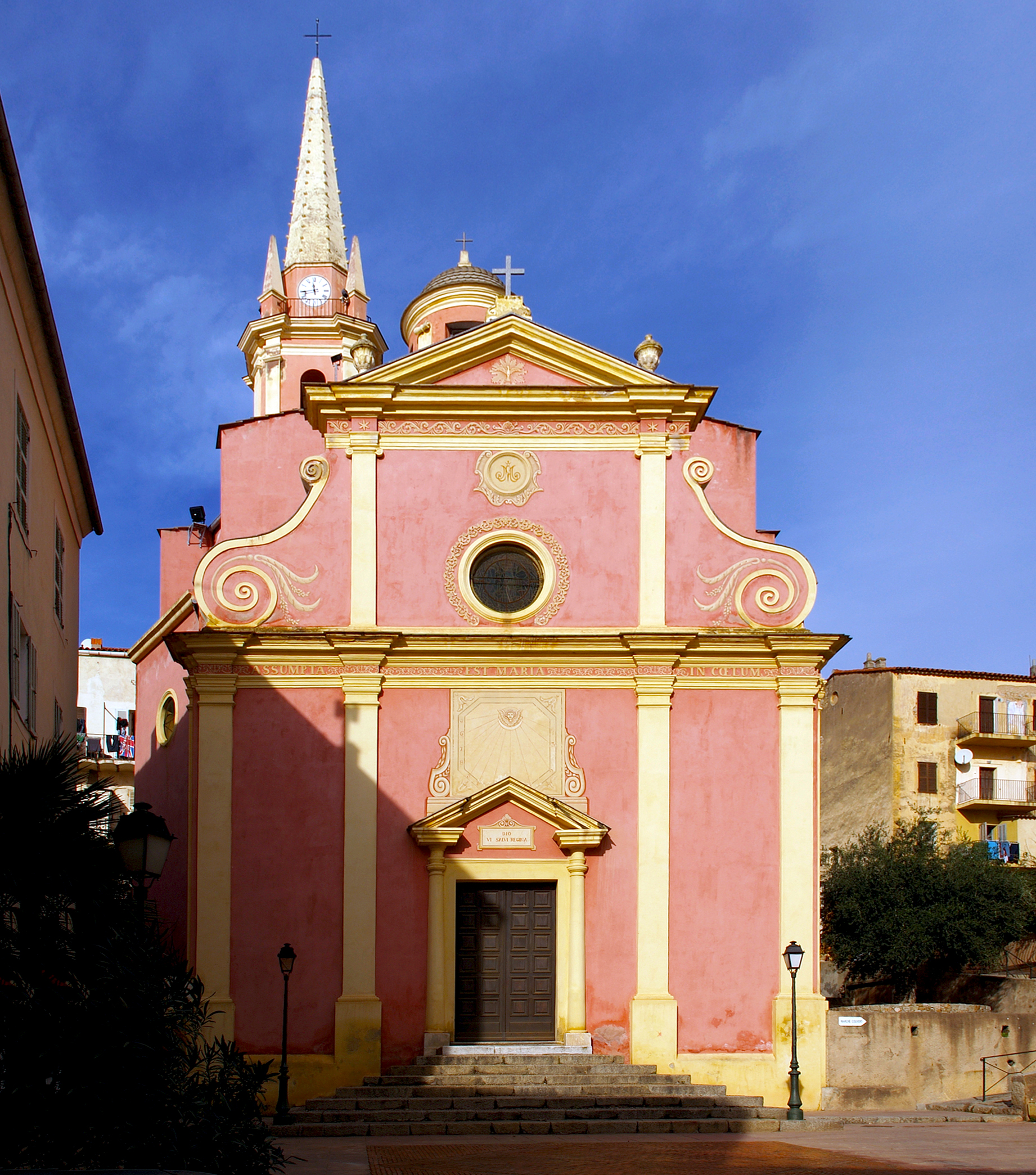 Calvi - Eglise Sainte-Marie-Majeure